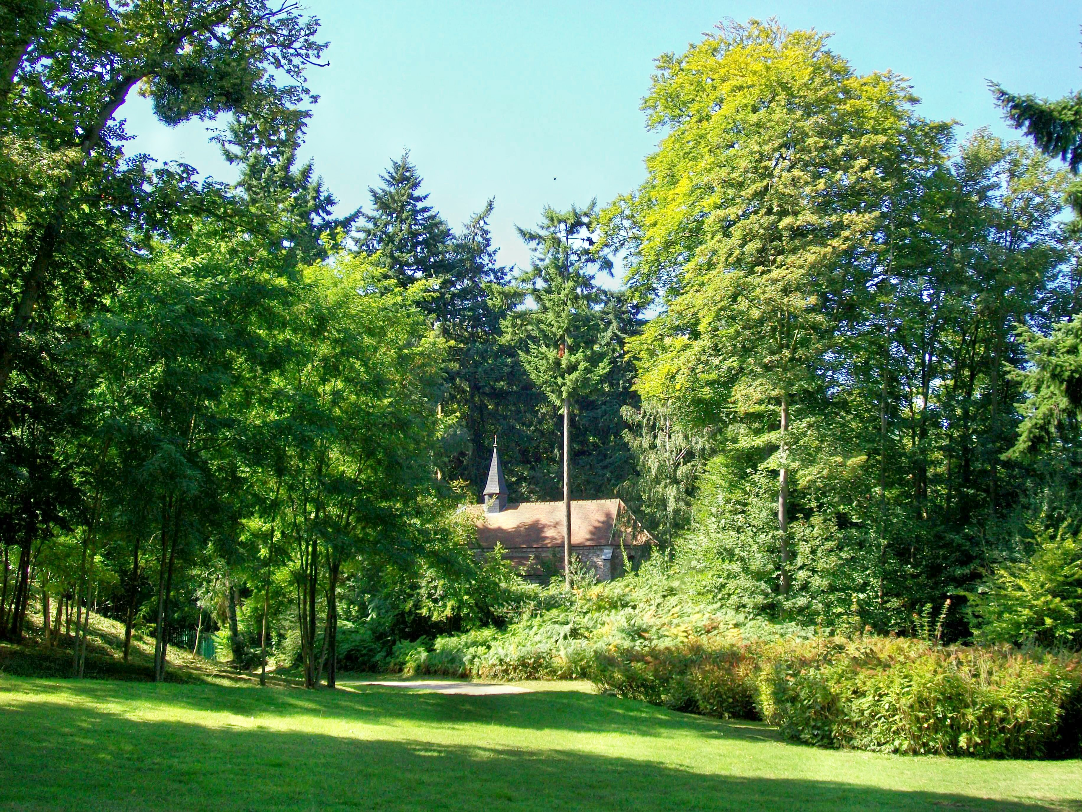 Domaine régional de Saint-Thibault, parc et chapelle. Elle est interdite d'accès car elle menace ruine.